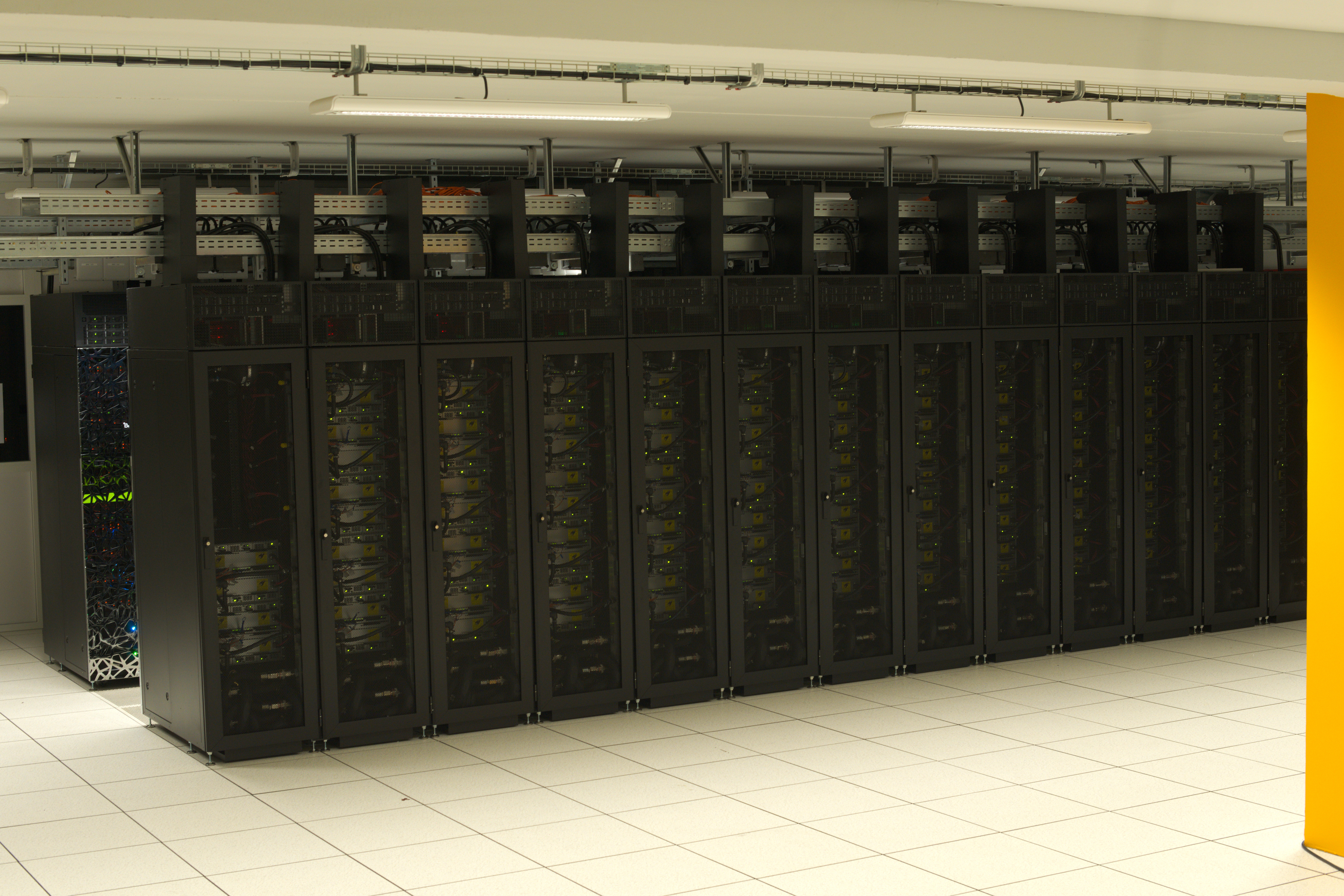 Superordinateur Occigen